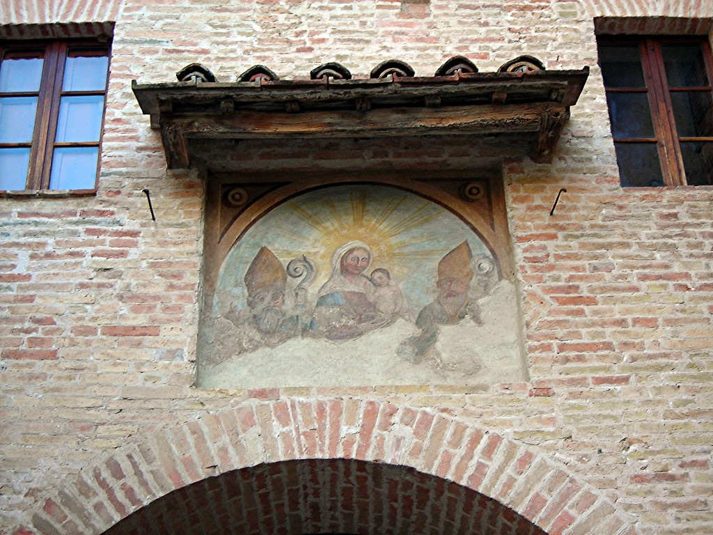 fresco in San Nicolo di Celle, Deruta, Perugia, Umbria, Italy